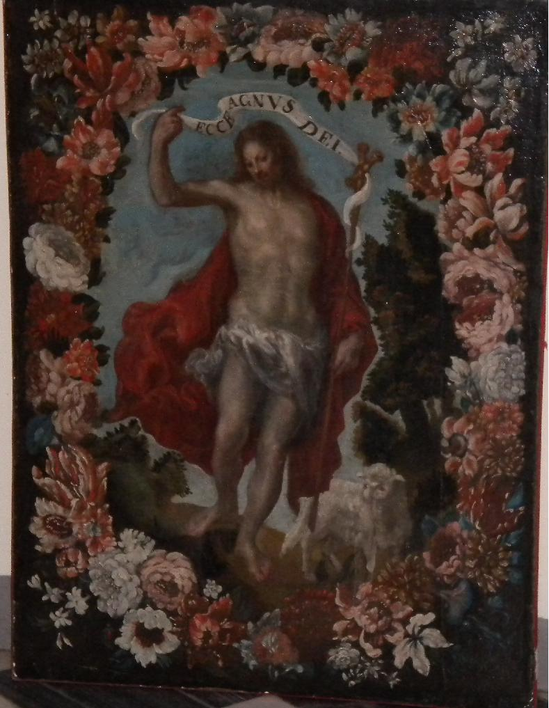 Francisco Camilo: "San Juan Bautista en Orla de Flores". 86*65cm. Oleo sobre lienzo. Colección particular. Bibliografía: TABAR ANITUA, Fernando: "Nuevas atribuciones a Francisco Camilo y Francisco Herranz, seguidor segoviano"